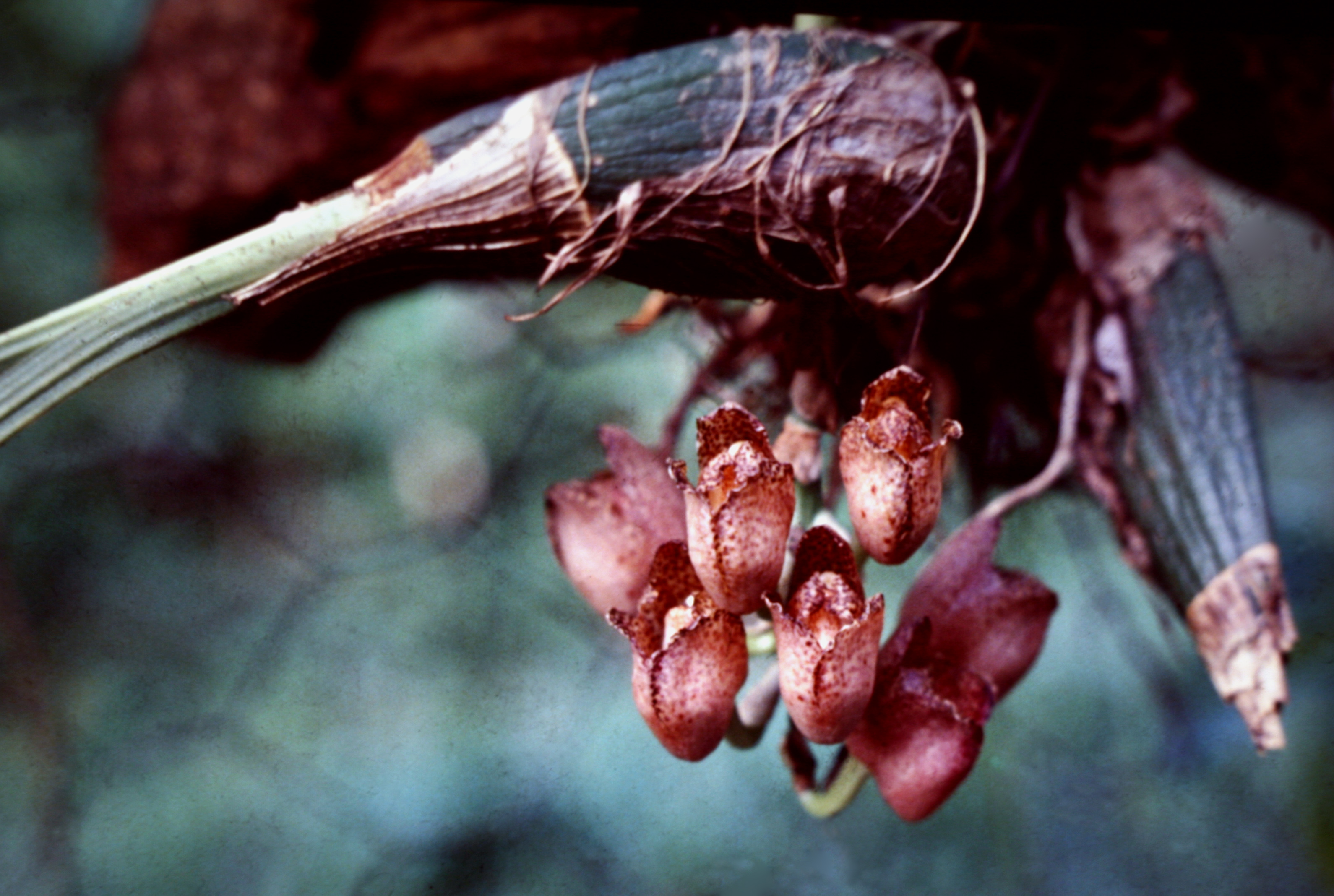 Peristeria guttata, Suriname.